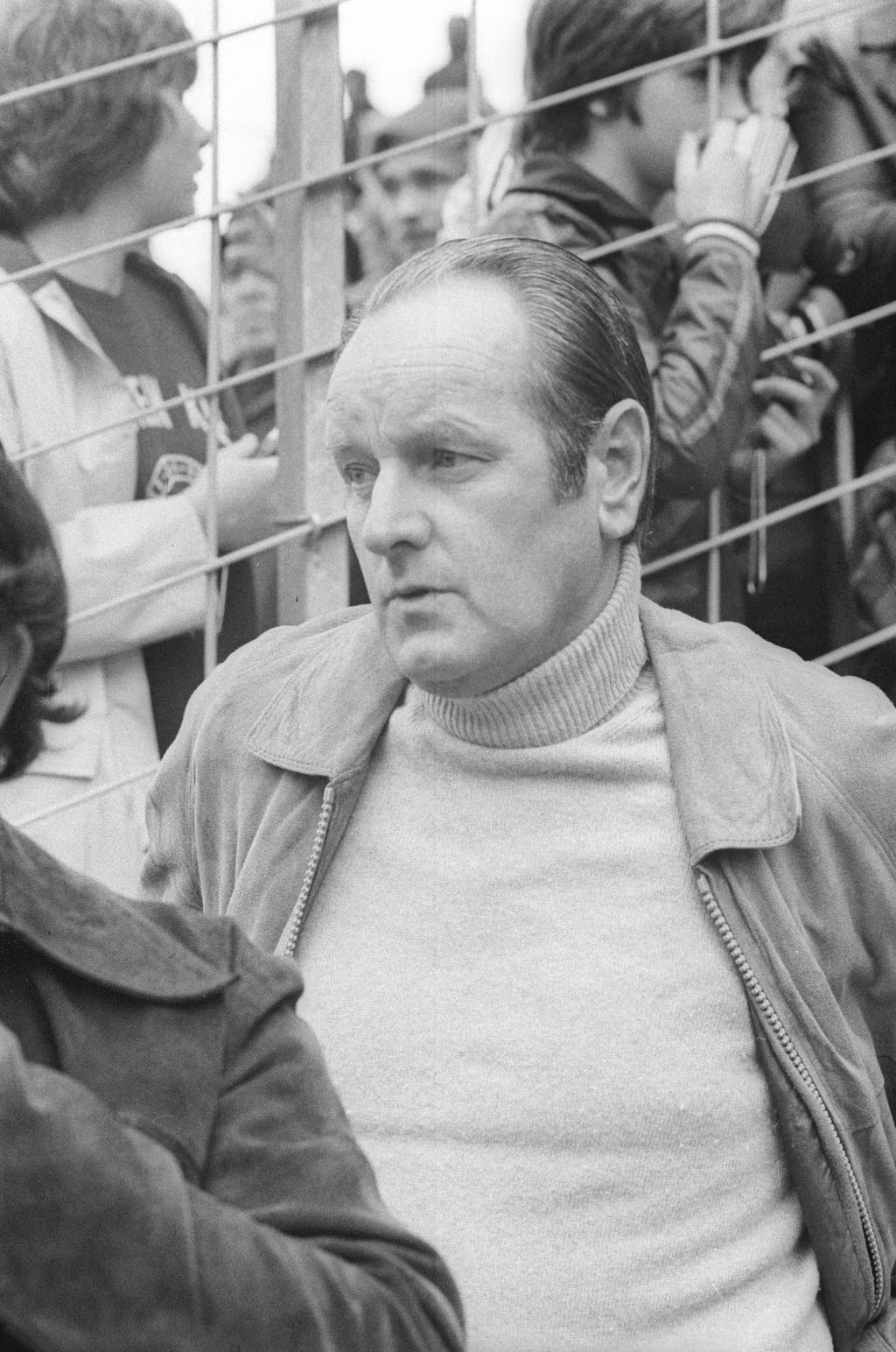 Trainer des Fußball-Bundesligisten Hamburger SV (HSV) beim Freundschaftsspiel gegen Holstein Kiel.